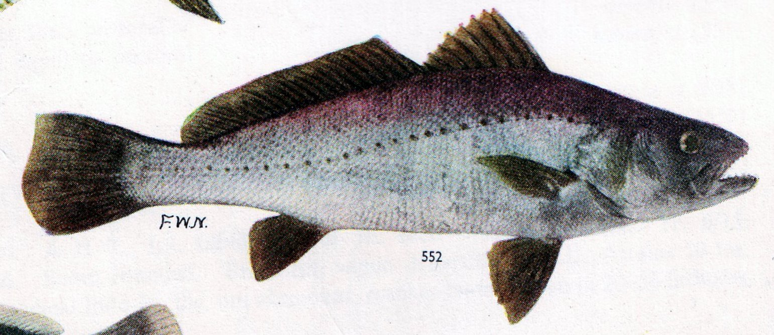 Kabeljou, Argyrosomus hololepidotus